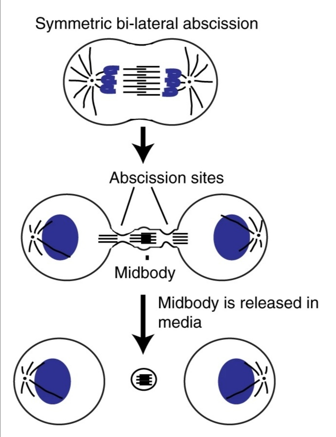 Figura 1_ El cuerpo de Flemming, posterior a la abscisión. b Abscisión celular simétrica. El cuerpo de Flemming se libera, en el espacio extracelular y luego se internaliza y acumula en las células interfásicas.